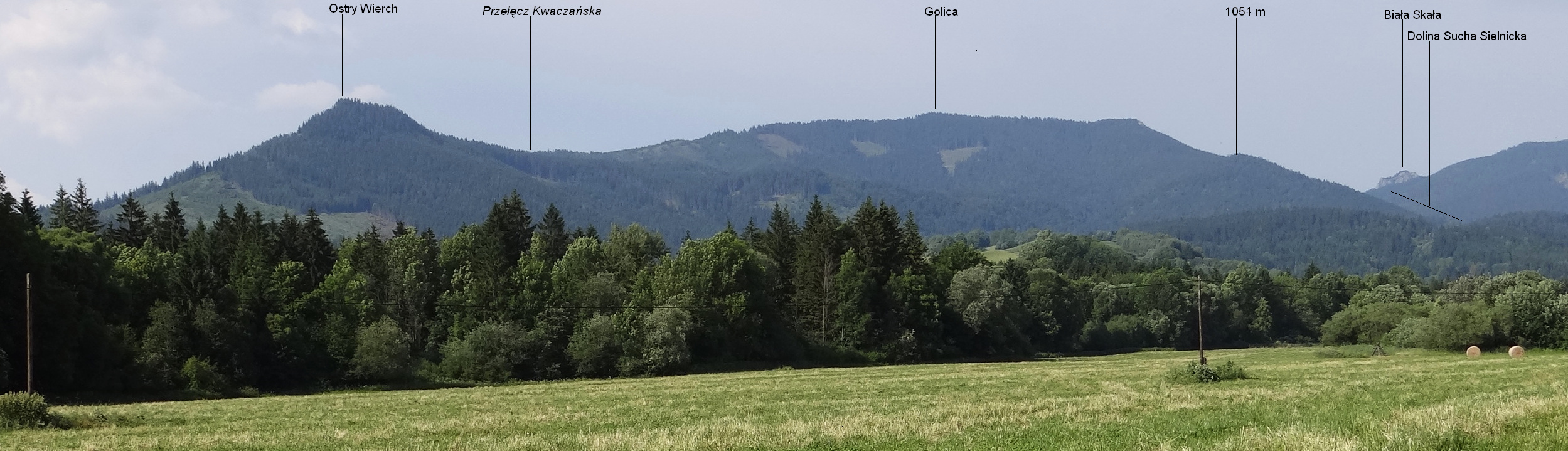 Widok z Liptowskich Matiaszowiec